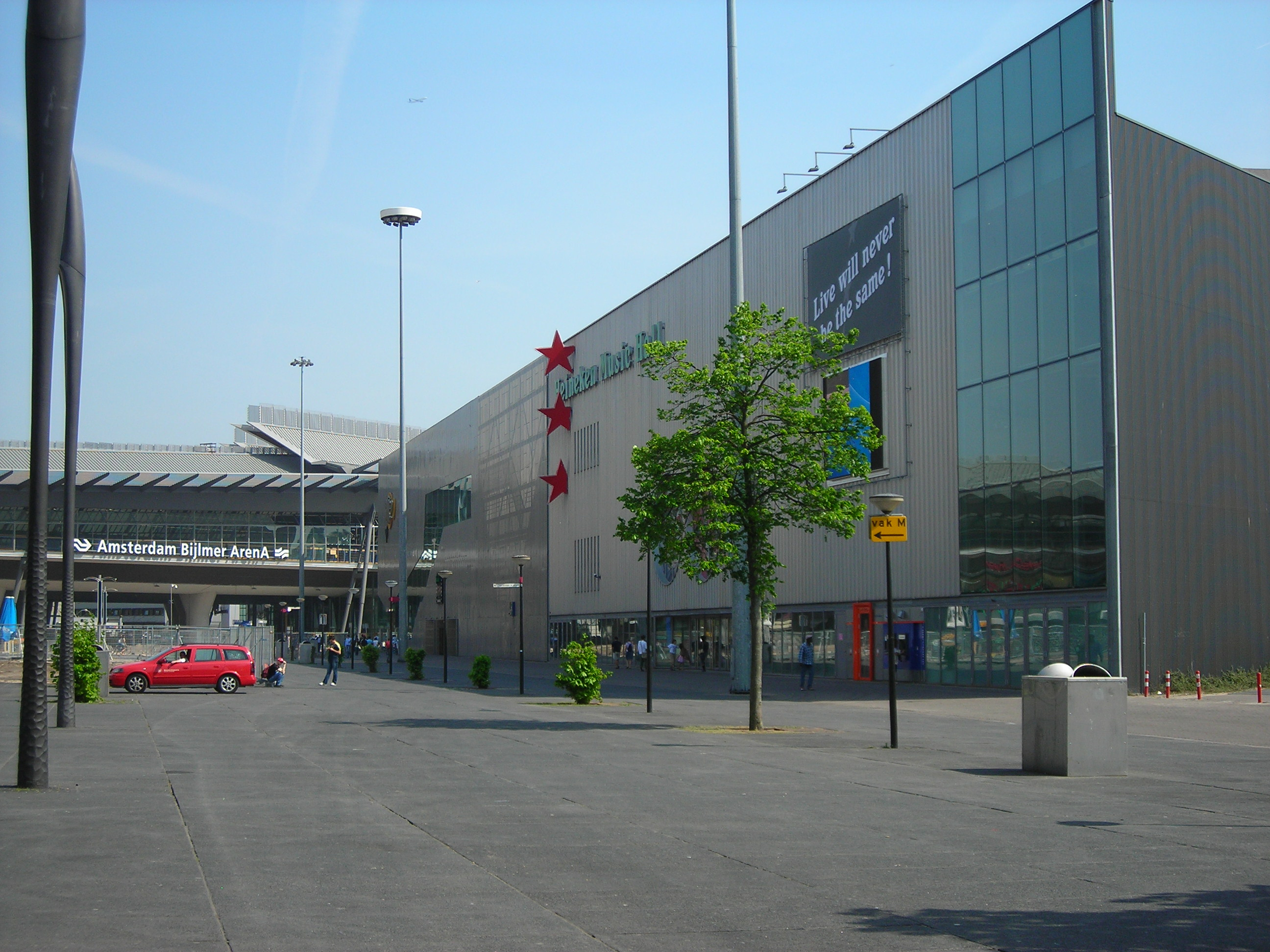 Heineken Music Hall and Station Amsterdam Bijlmer ArenA